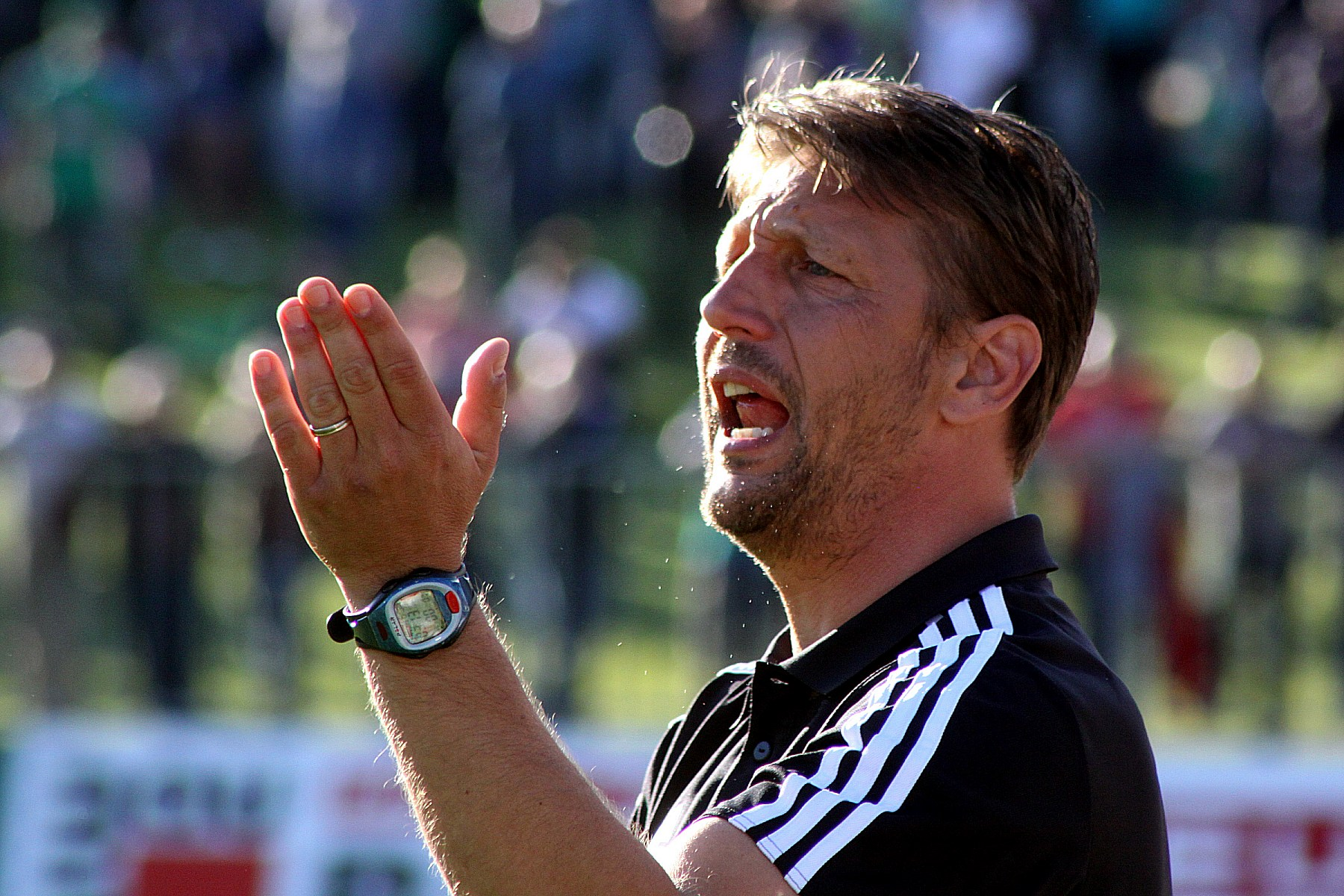 Meisterschaftsspiel der österreichischen Bundesliga: SV Mattersburg gegen SK Rapid Wien am 18. Mail 2013 (2:0)] im Mattersburger Pappelstadion.] - Das Foto zeigt den Trainer des SK Rapid Wien Zoran Barisic.